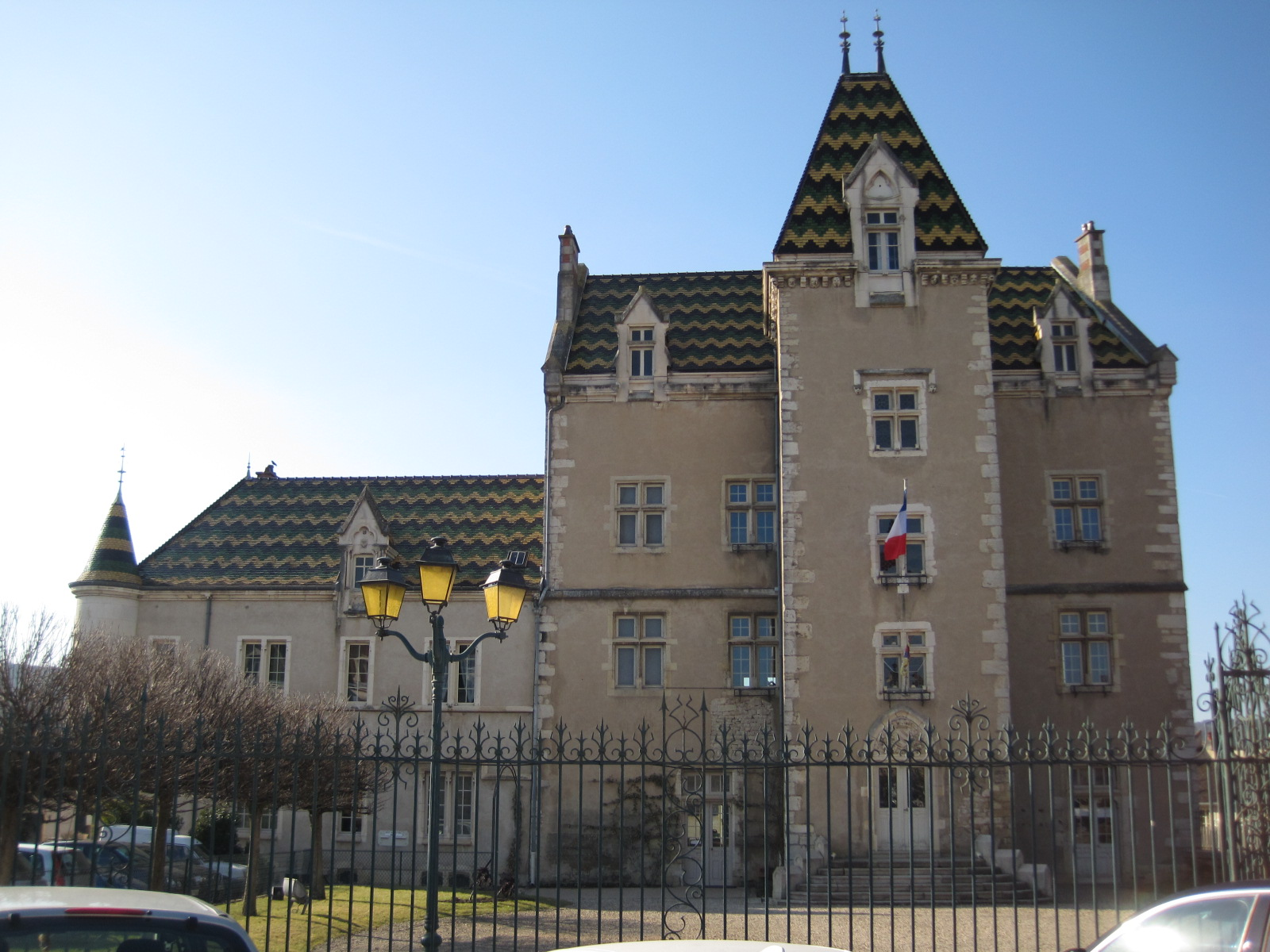 Ancien château fort de Meursault actuelle hôtel de ville